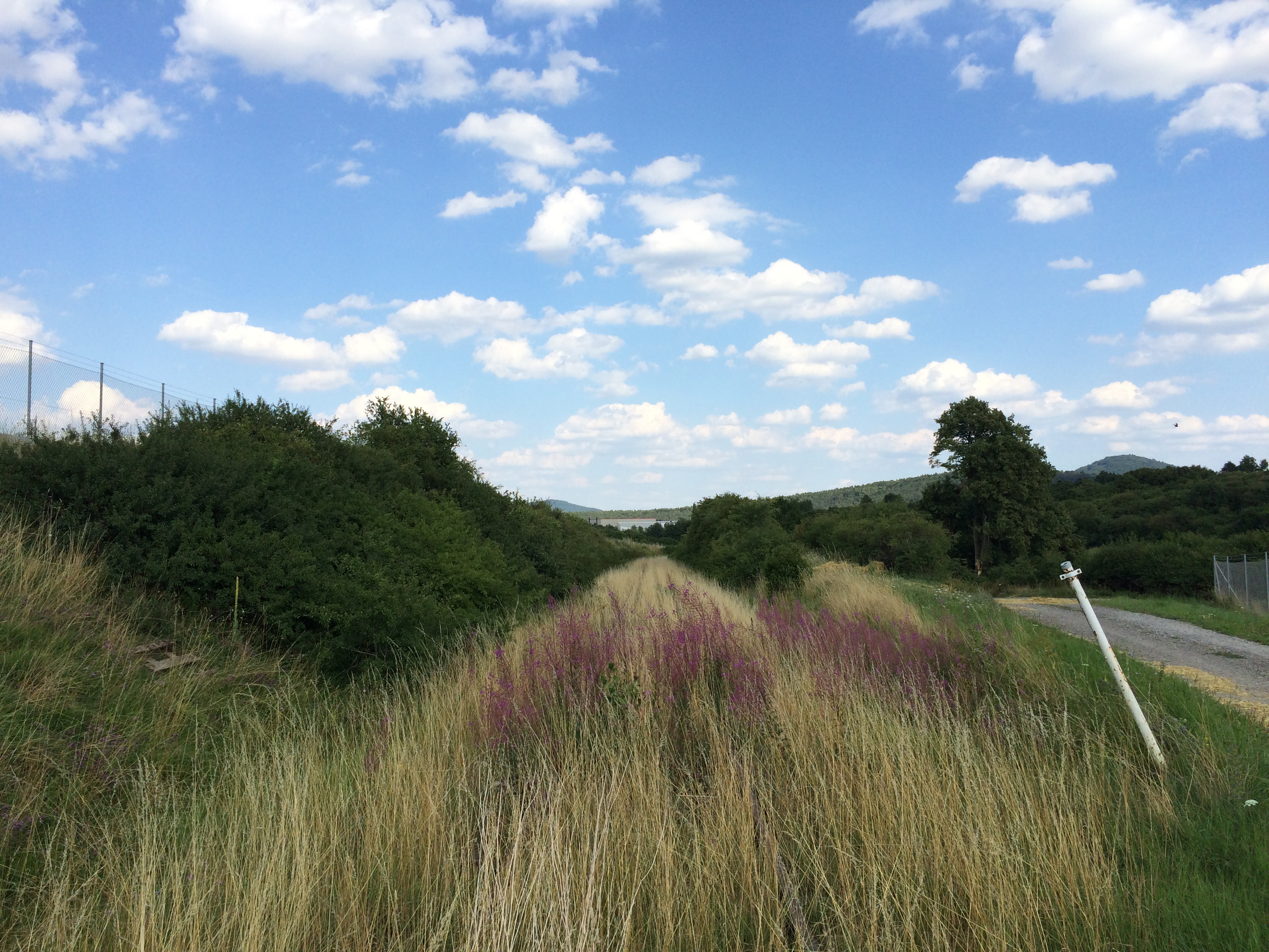 Die Bahnstrecke zwischen Wolfhagen und der Pommernkaserne (Gasterfeld) am Bahnübergang im Solarpark Wolfhagen